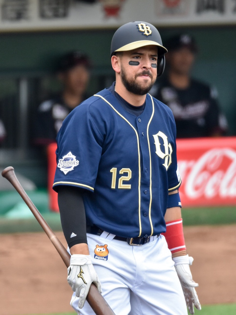 2017年6月24日、ほっともっとフィールド神戸にて撮影